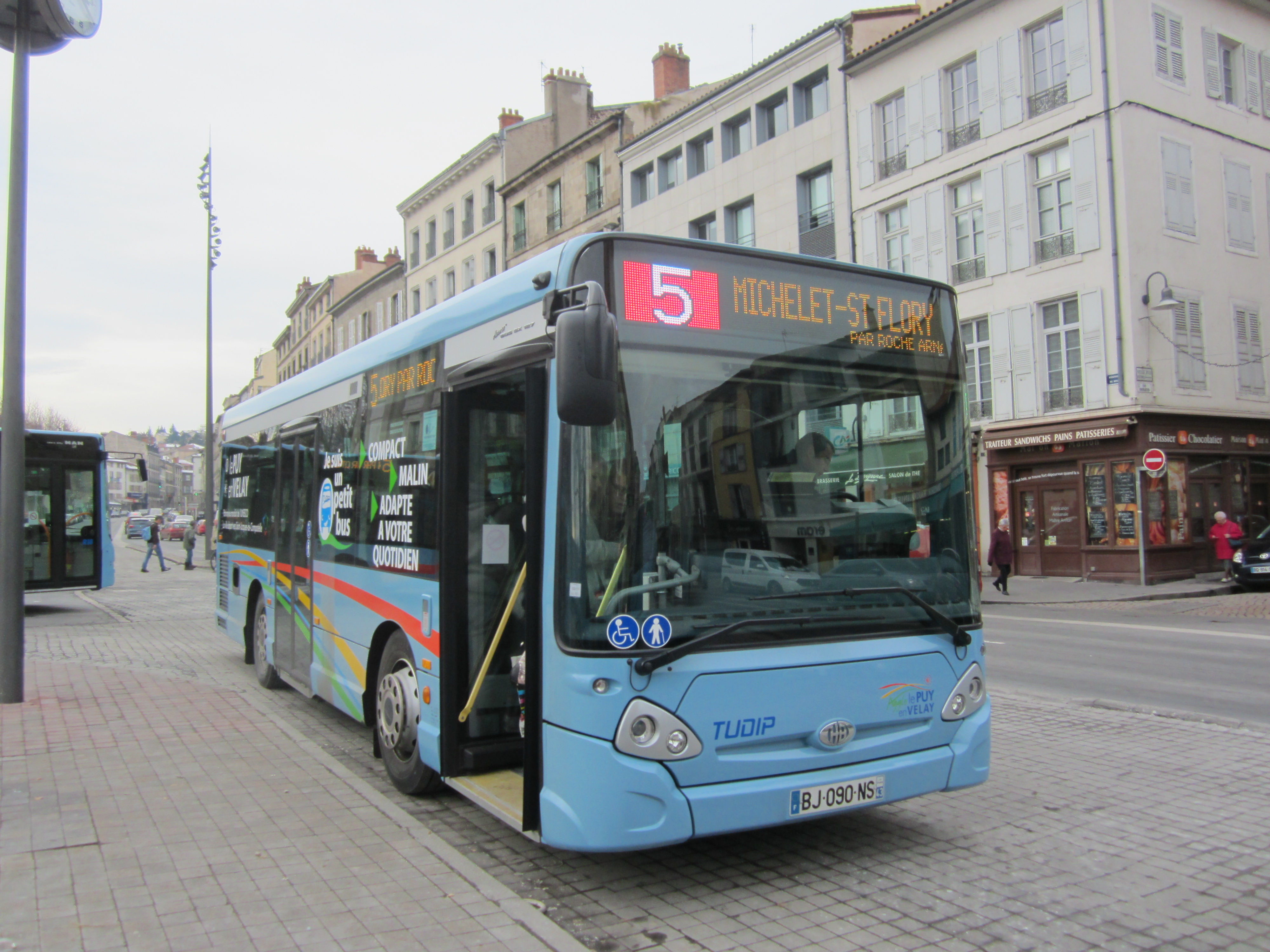 Heuliez GX 127 sur la ligne 5 du réseau TUDIP au Puy-en-Velay, sur la place Michelet.